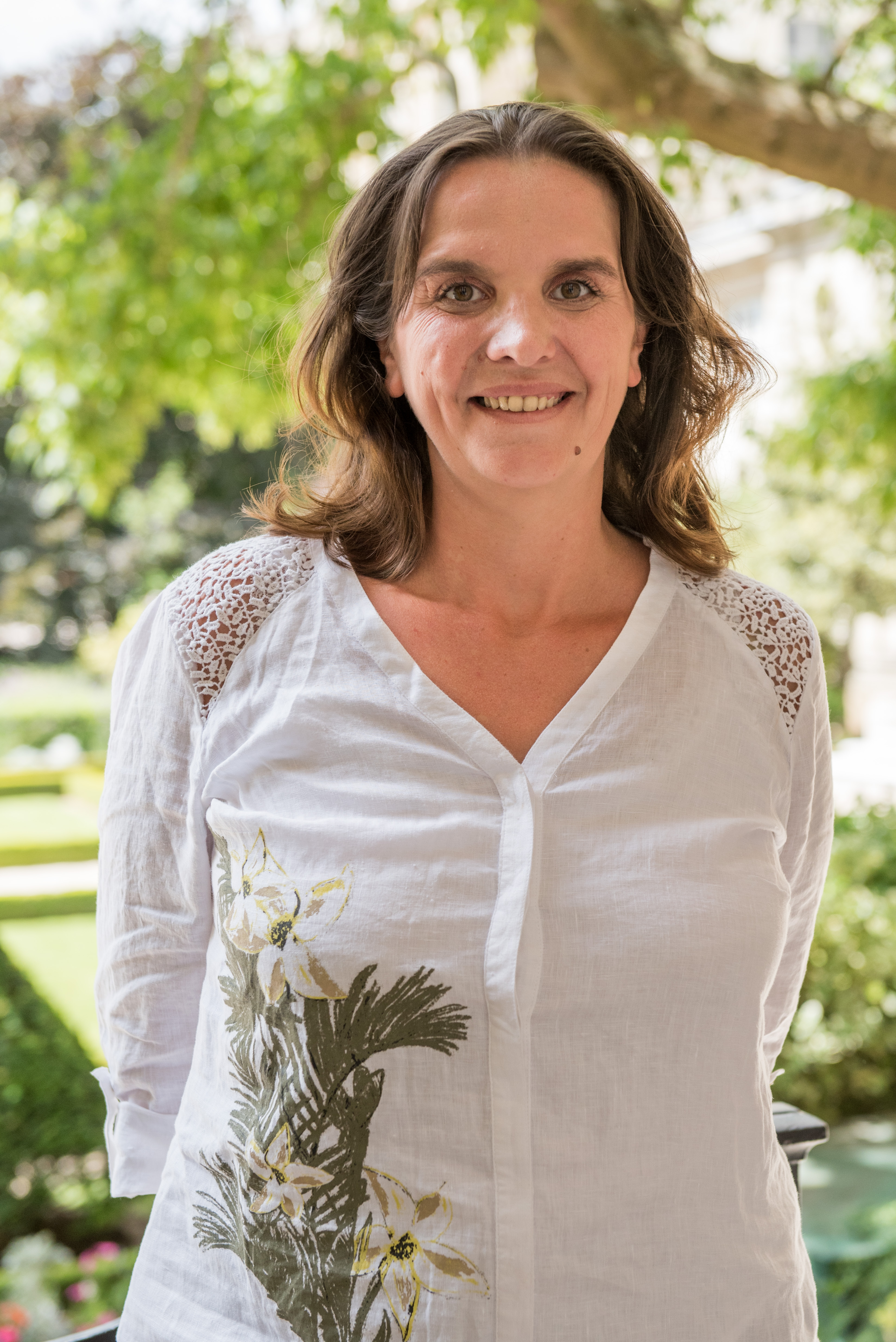 Caroline Fiat dans le jardin des Quatre colonnes du palais Bourbon en 2017.